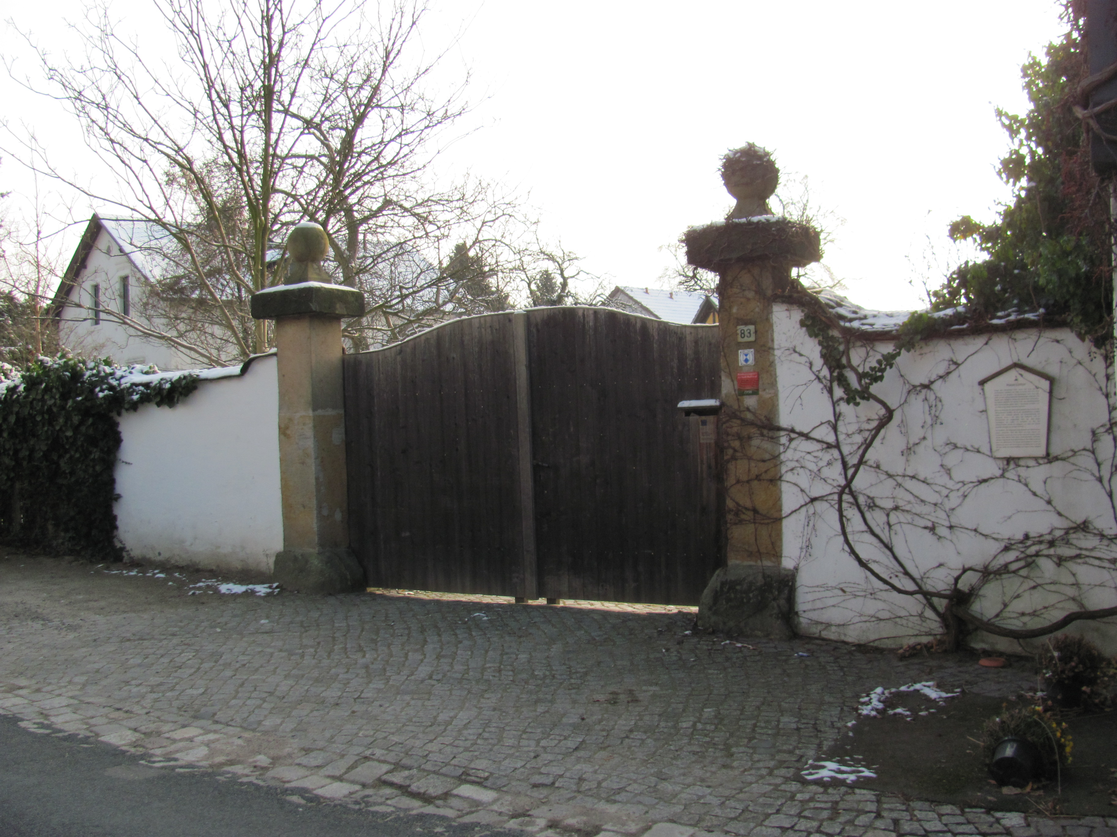 Radebeul, Haus Lotter Außenanlagen